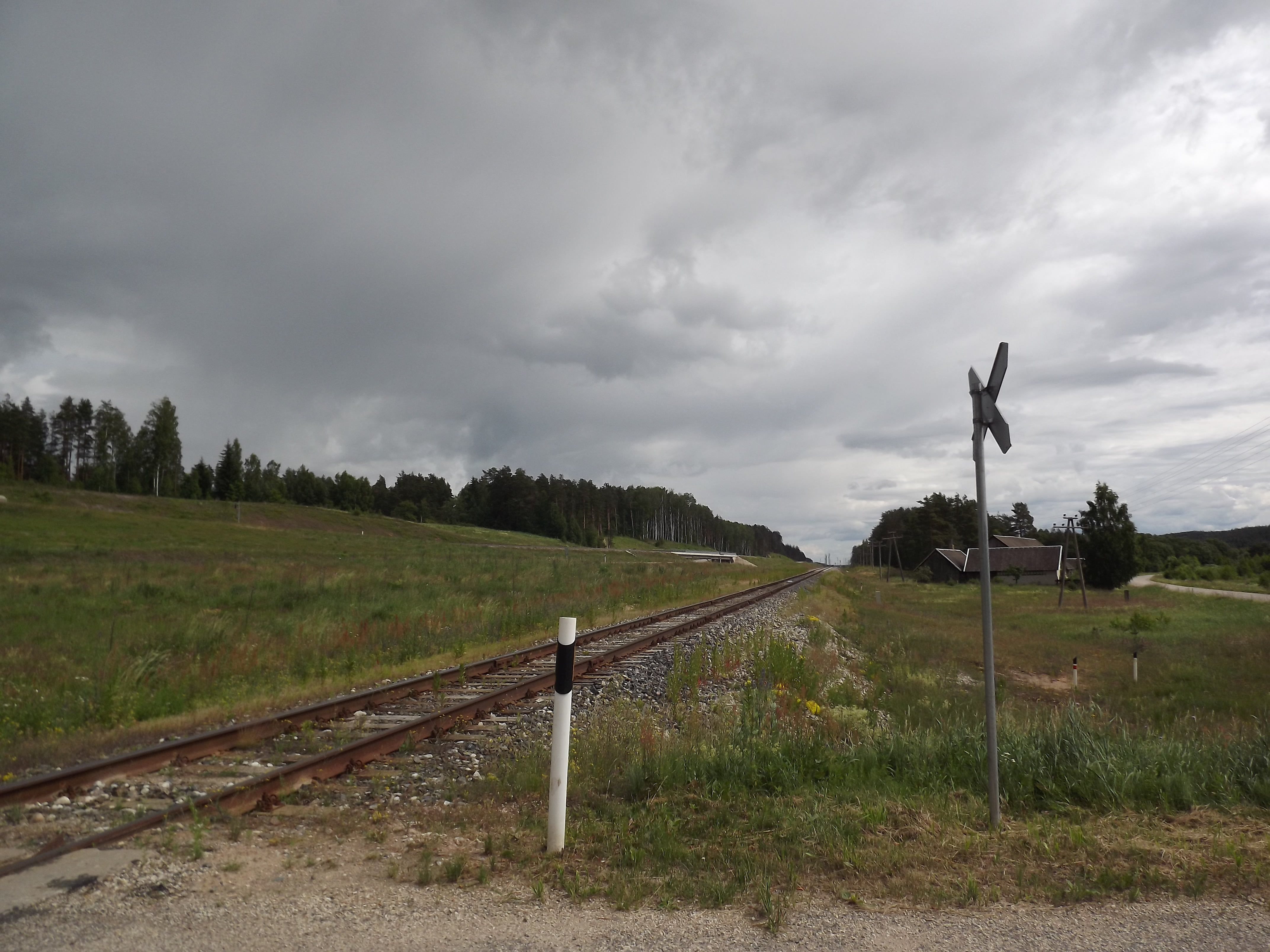 Endise Veski raudteepeatuse asukoht, taamal Koidula raudteepiirijaam